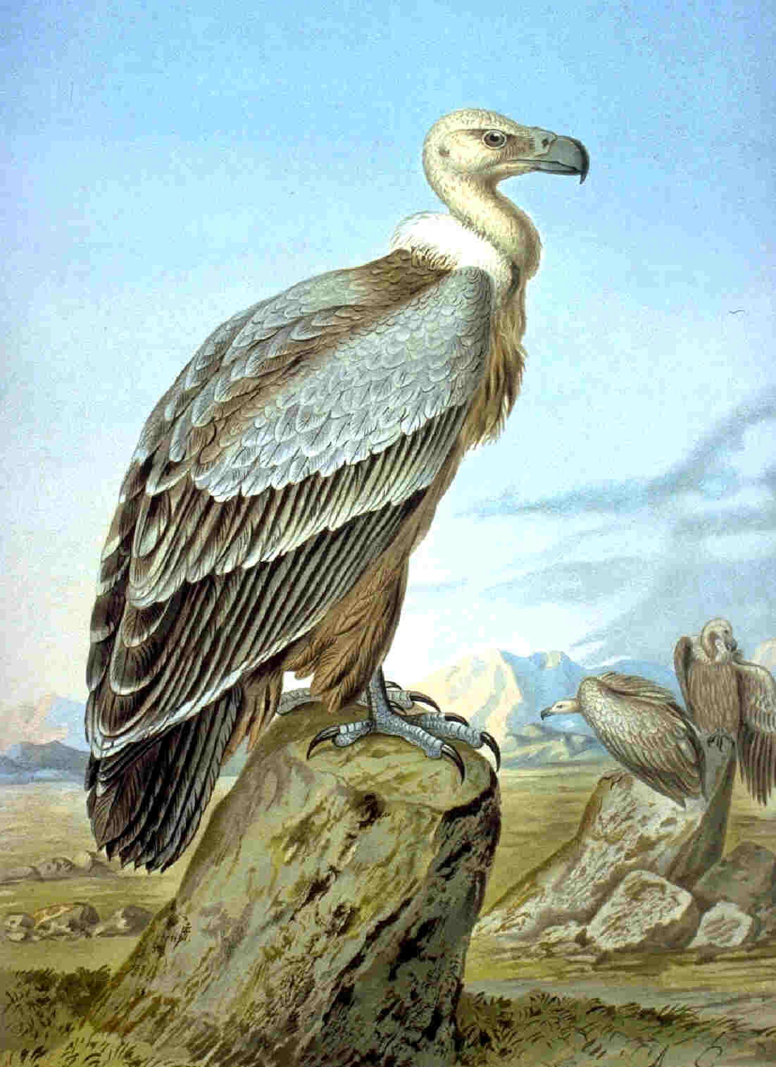 Griffon Vulture (Gyps fulvus)